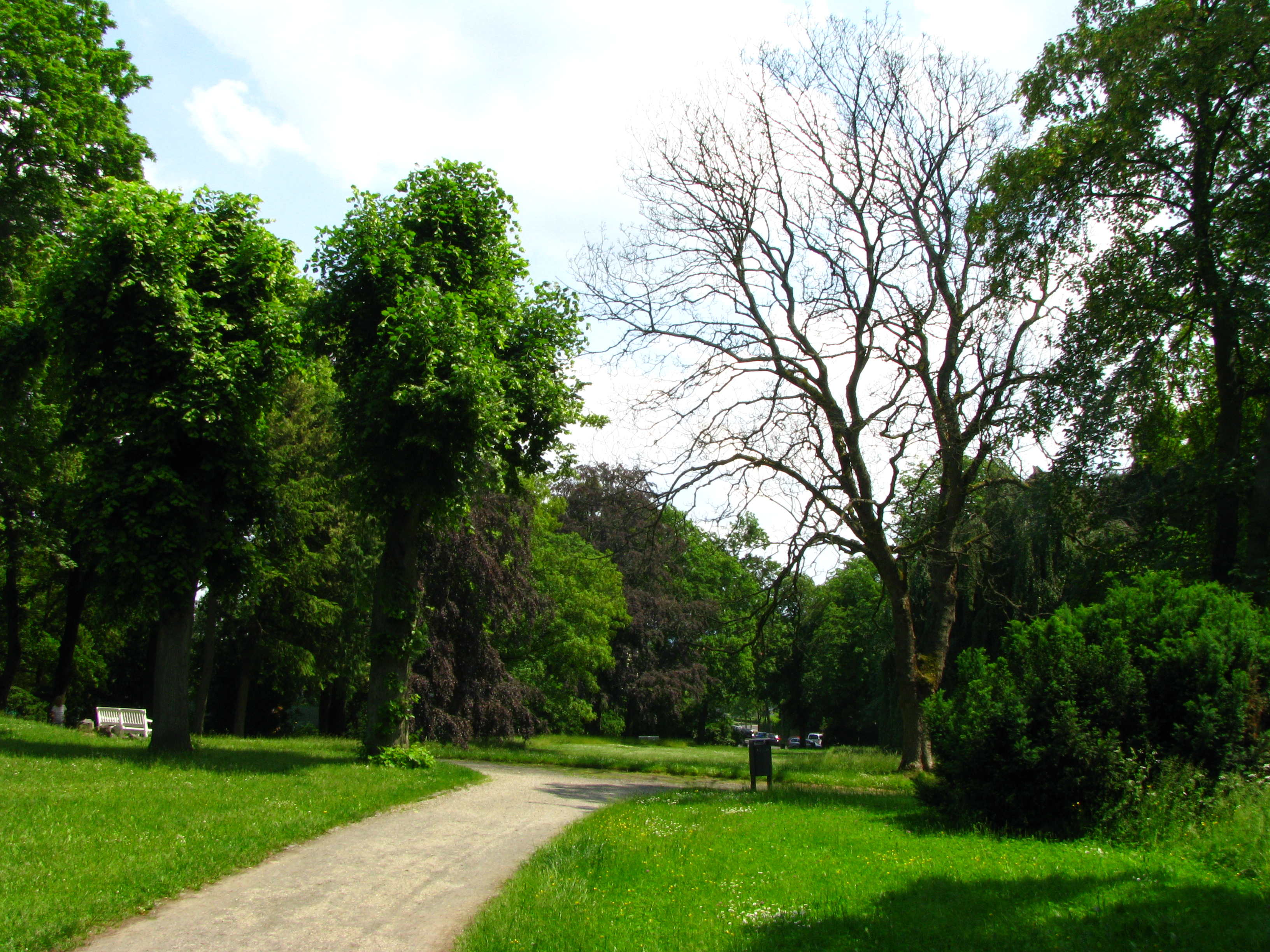 Blick vom höchsten Punkt im Aschrottpark in Richtung Osten